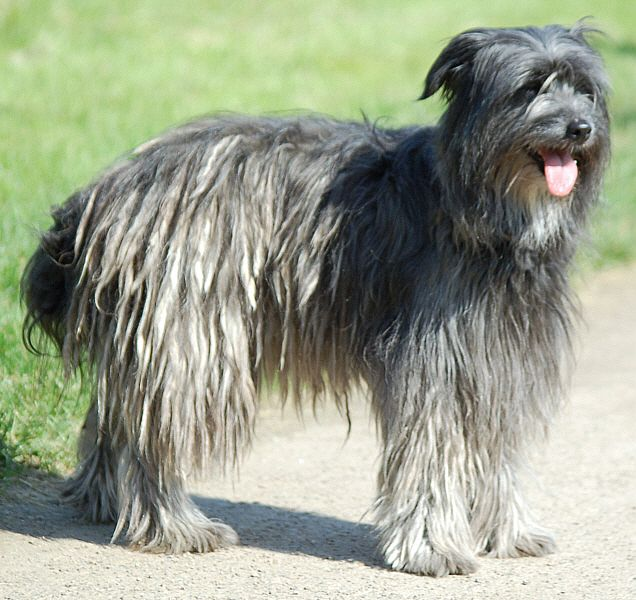 Berger des Pyrénées (Langhaar-Zott) Sonstiges: Asha vom Sashi-eda (VDH-Europasiegerin 2004)